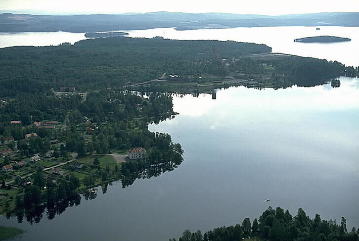 Motiv: Persberg Nyckelord: Flygbilder, Riksintressen Kategori: Insjömiljöer Persberg